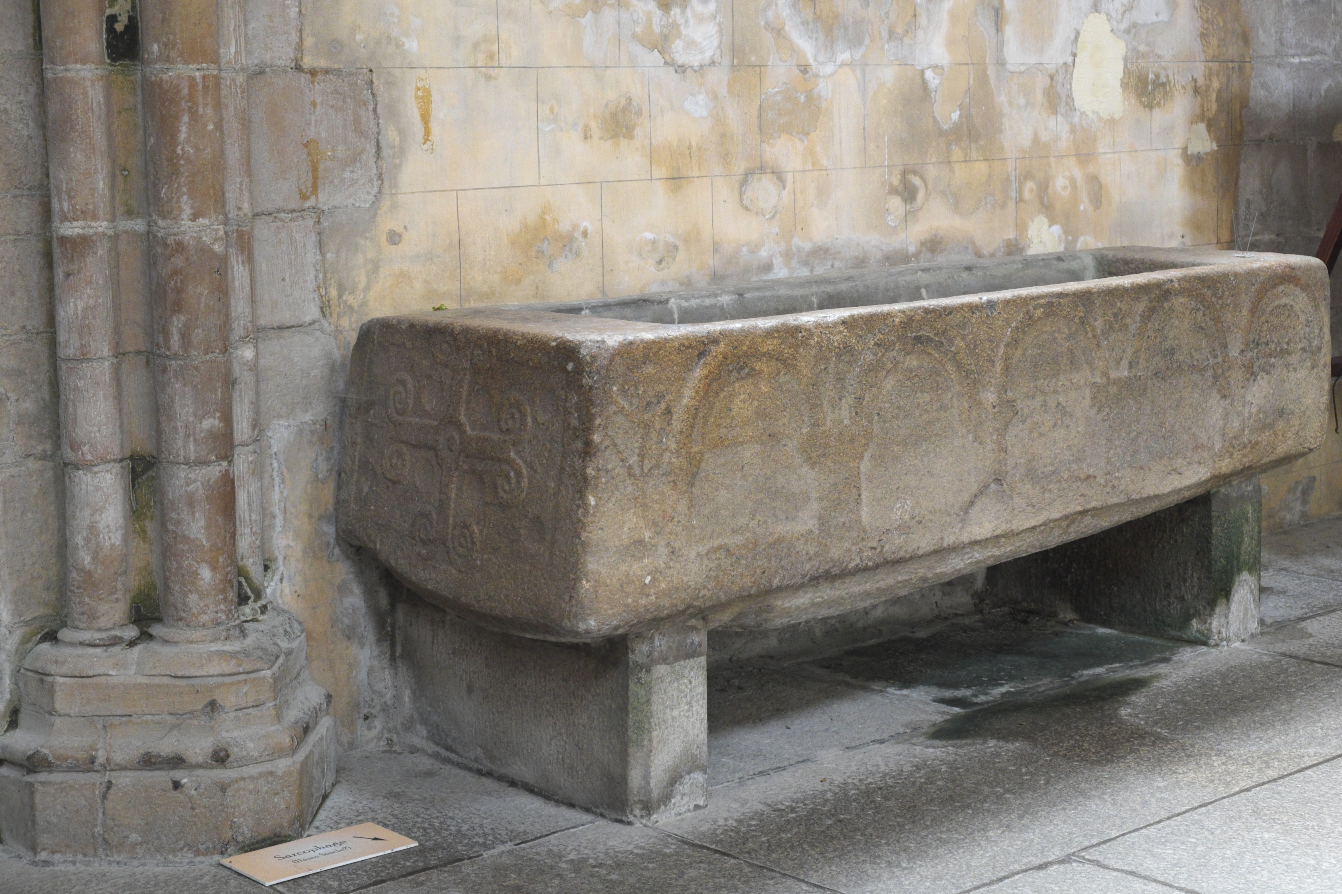 Ehemalige Kathedrale Saint-Paul-Aurélien in Saint-Pol-de-Léon im Département Finistère (Region Bretagne/Frankreich), romanischer Sarkophag aus dem 11. Jahrhundert (?)